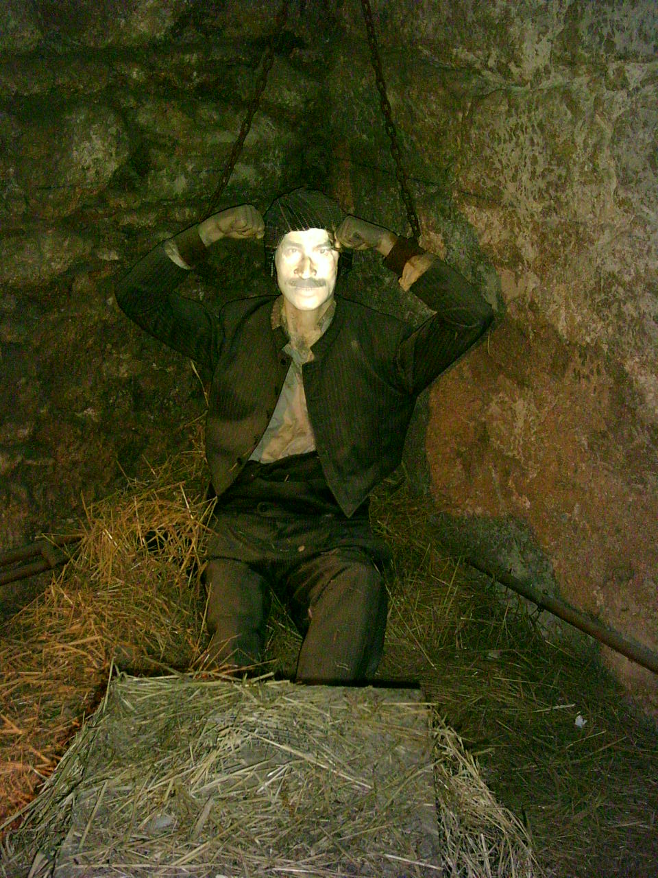 Recreación de un preso en el Castillo de Santa Catalina de Jaén.